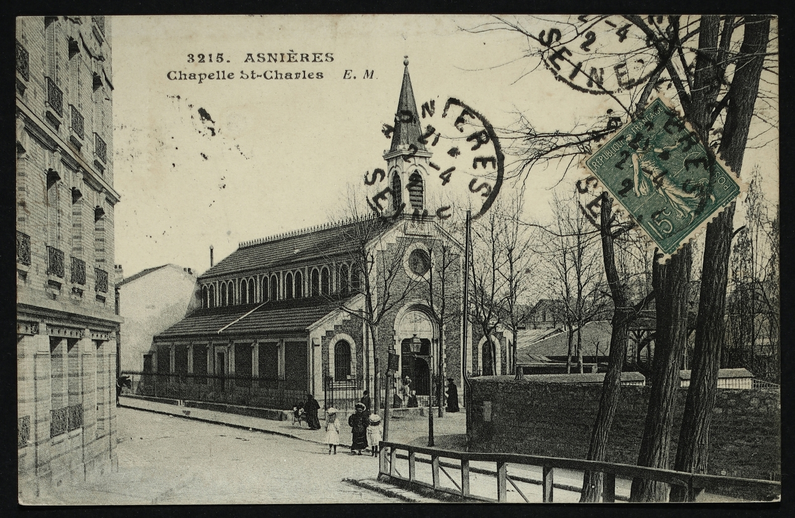 Asnières-sur-Seine.Chapelle Saint-Charles.Pont des Couronnes.Rue Auguste-Bailly